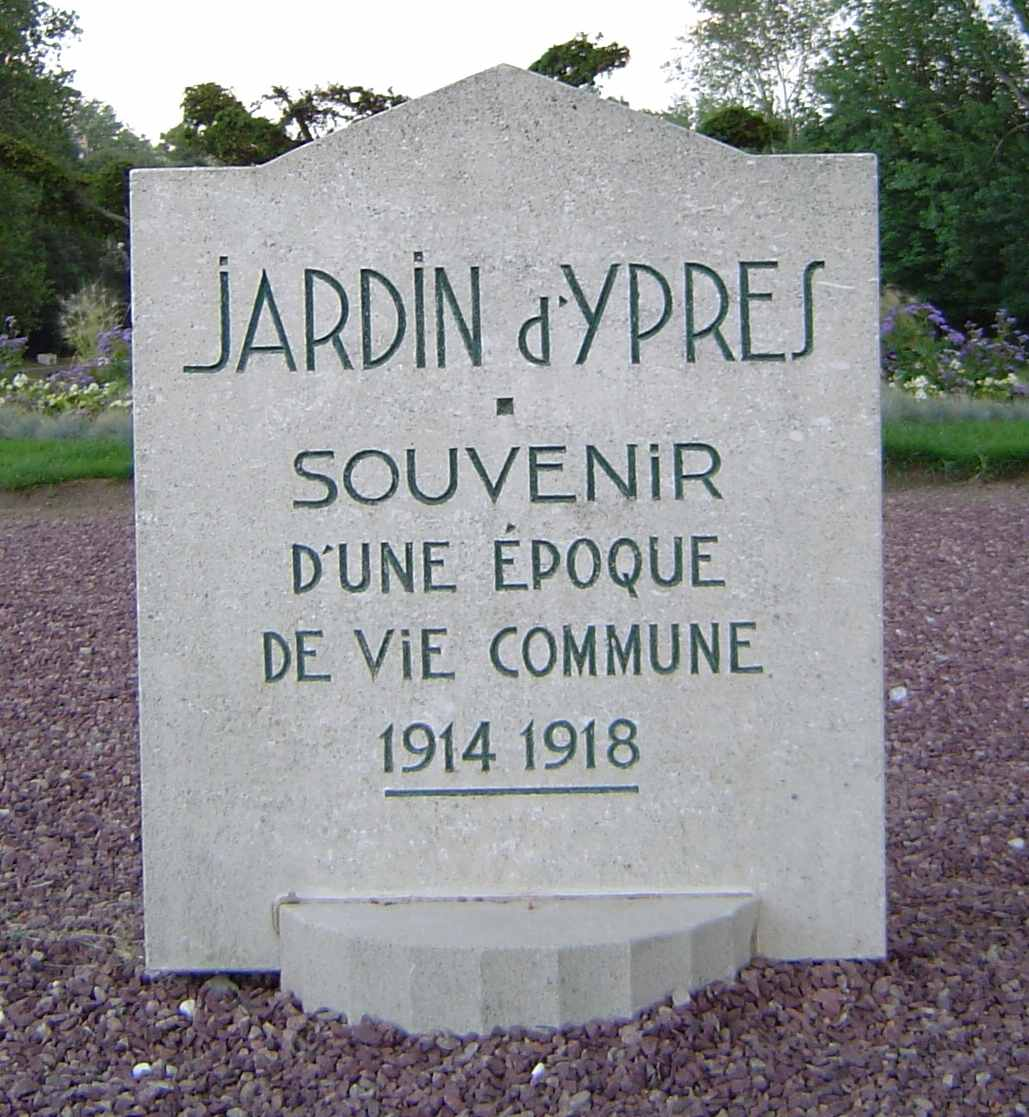 Photo prise par moi-même le 19 juillet 2006